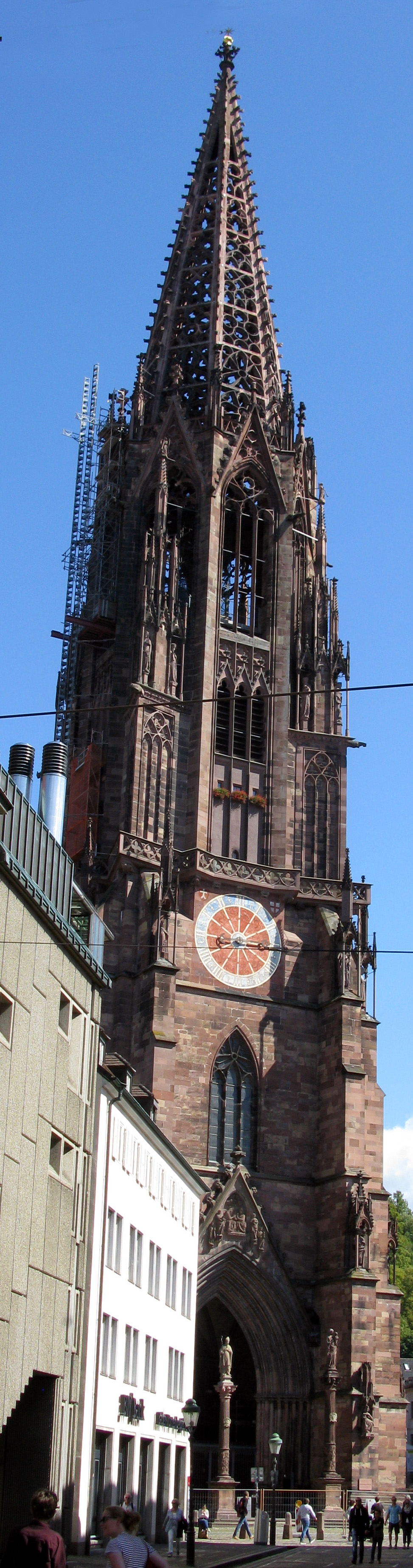 Freiburger Münsterturm, der nach zwölf Jahren wieder (fast) gerüstfrei ist